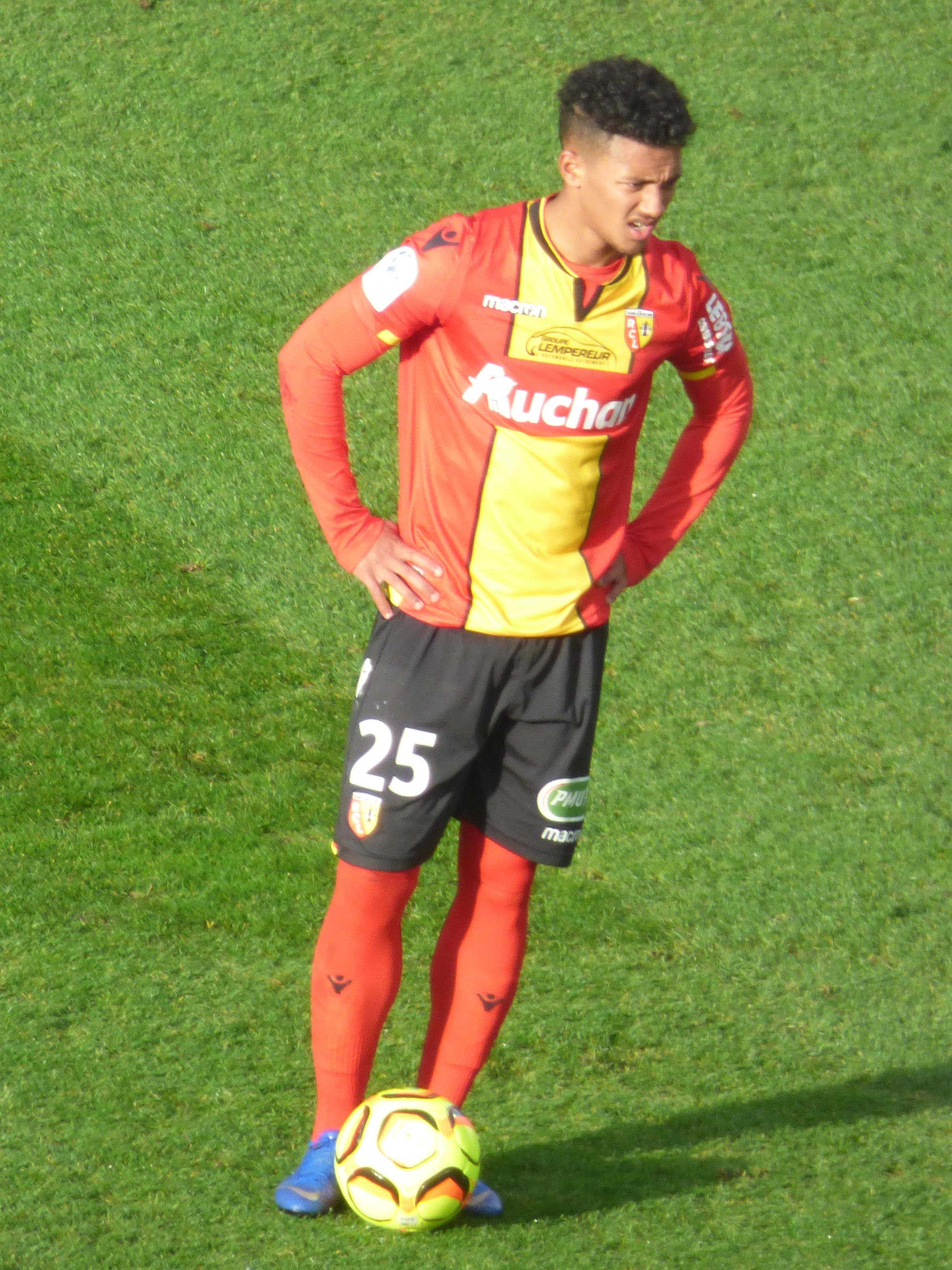 Mounir Chouiar pendant le match RC Lens / FC Metz, comptant pour la vingt-quatrième journée du championnat de France de Ligue 2 2018-2019, le 9 février 2019, au Stade Bollaert-Delelis.